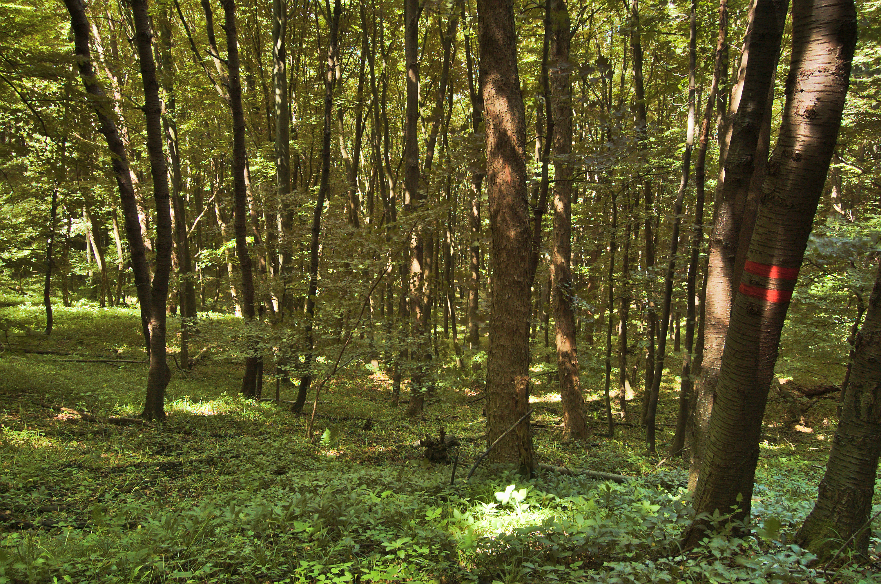 Přírodní památka Uvezené, okres Uherské Hradiště